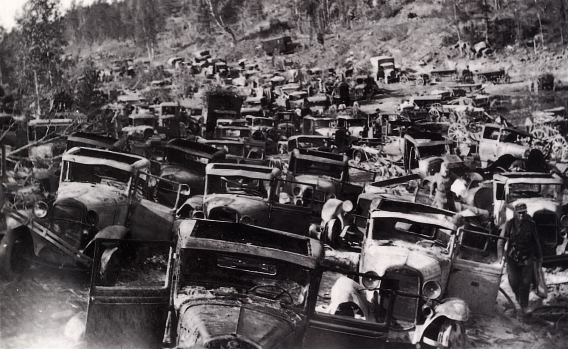 Karilahdessa vuonna 1941 vetäytyneen vihollisen jättämää kalustoa.